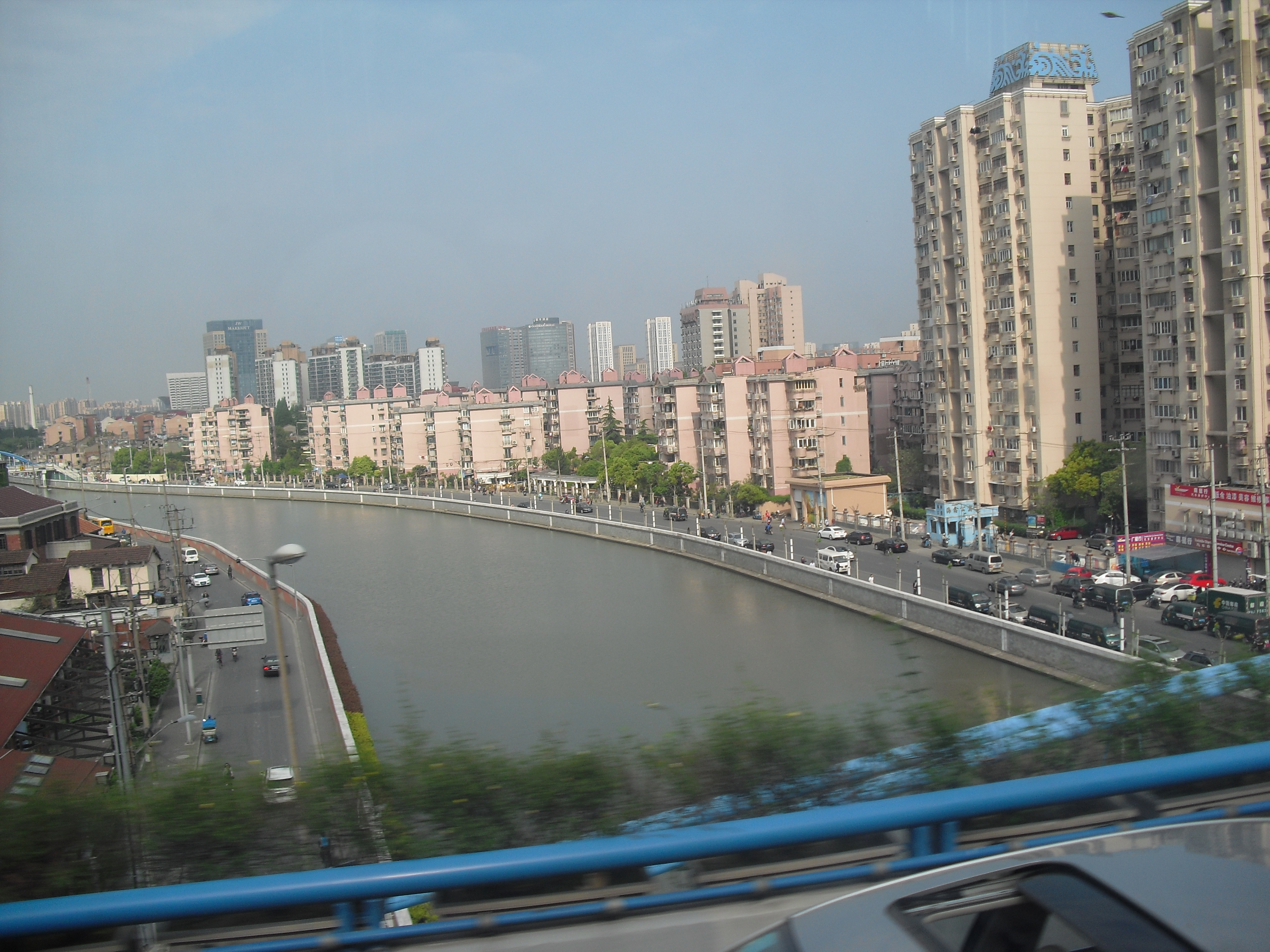 隔苏州河自长宁区向普陀区方向眺望。 摄于中环路上，2015年4月27日。 文言: 长宁区同普陀区，隔吴淞江相望。 于中环路上取像，西元二〇一五年四月27日。